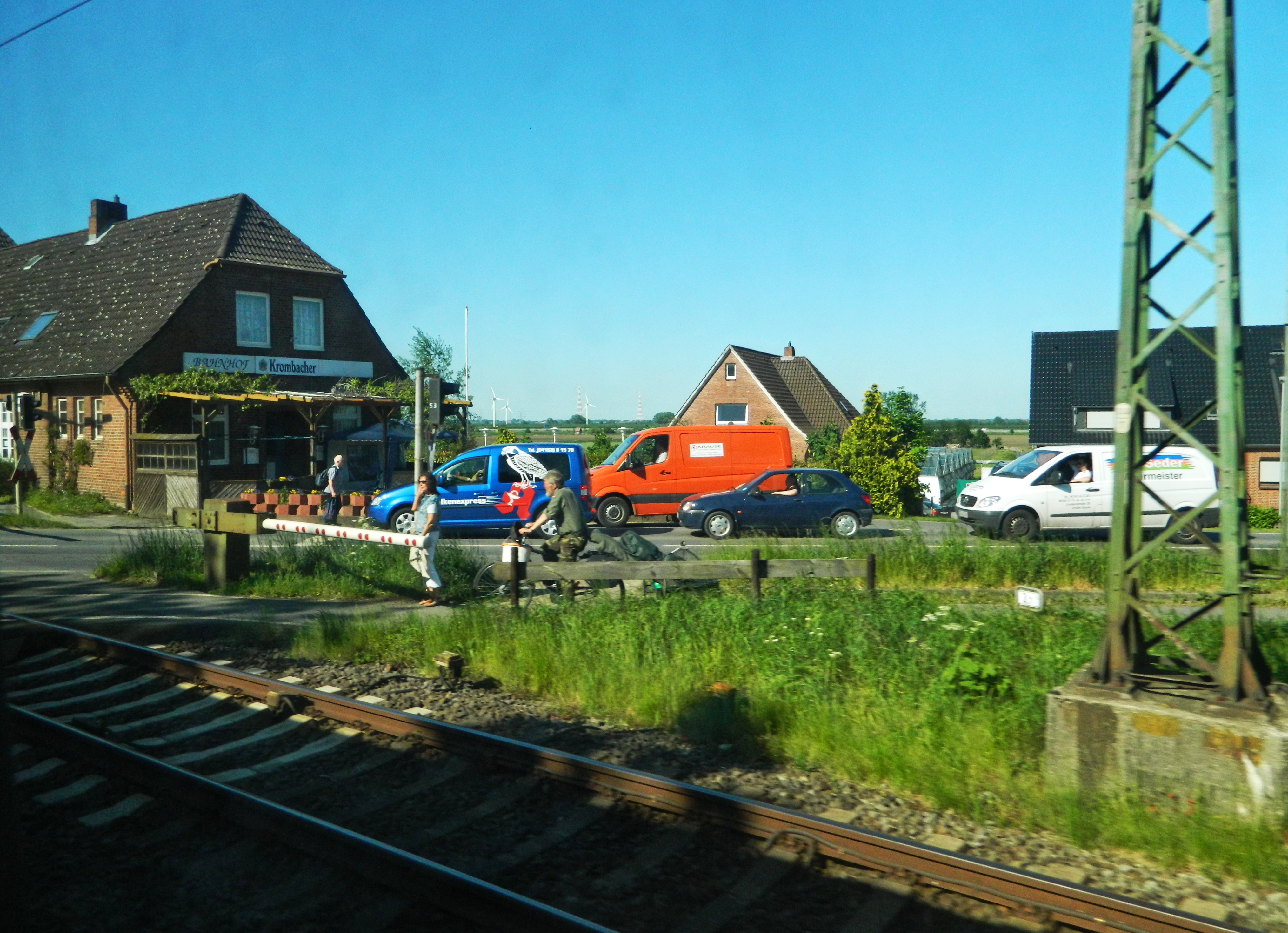 Dollern, Germany